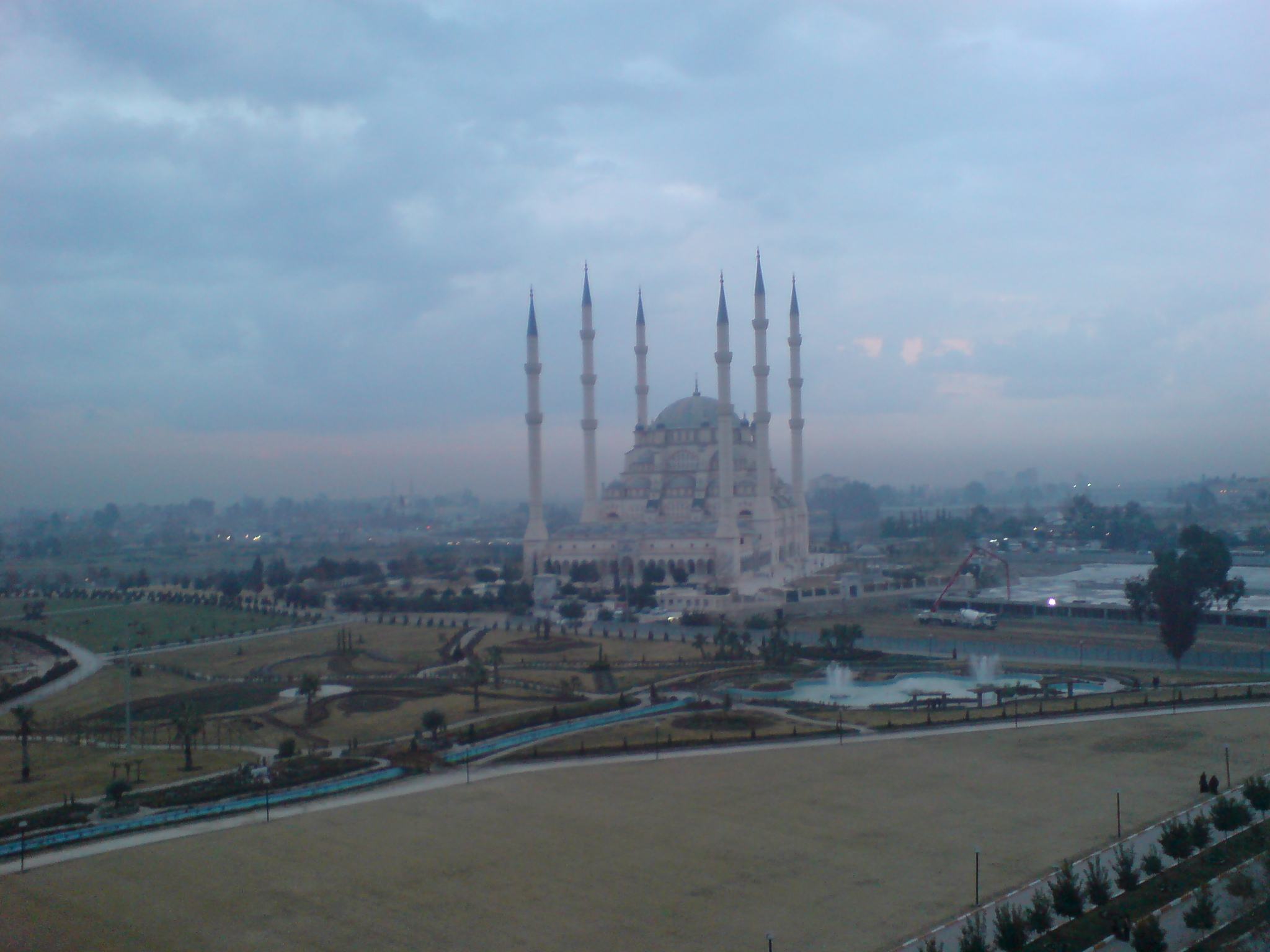 Adana Sabancı Merkez Camii Ocak 2007de çekilmiştir.